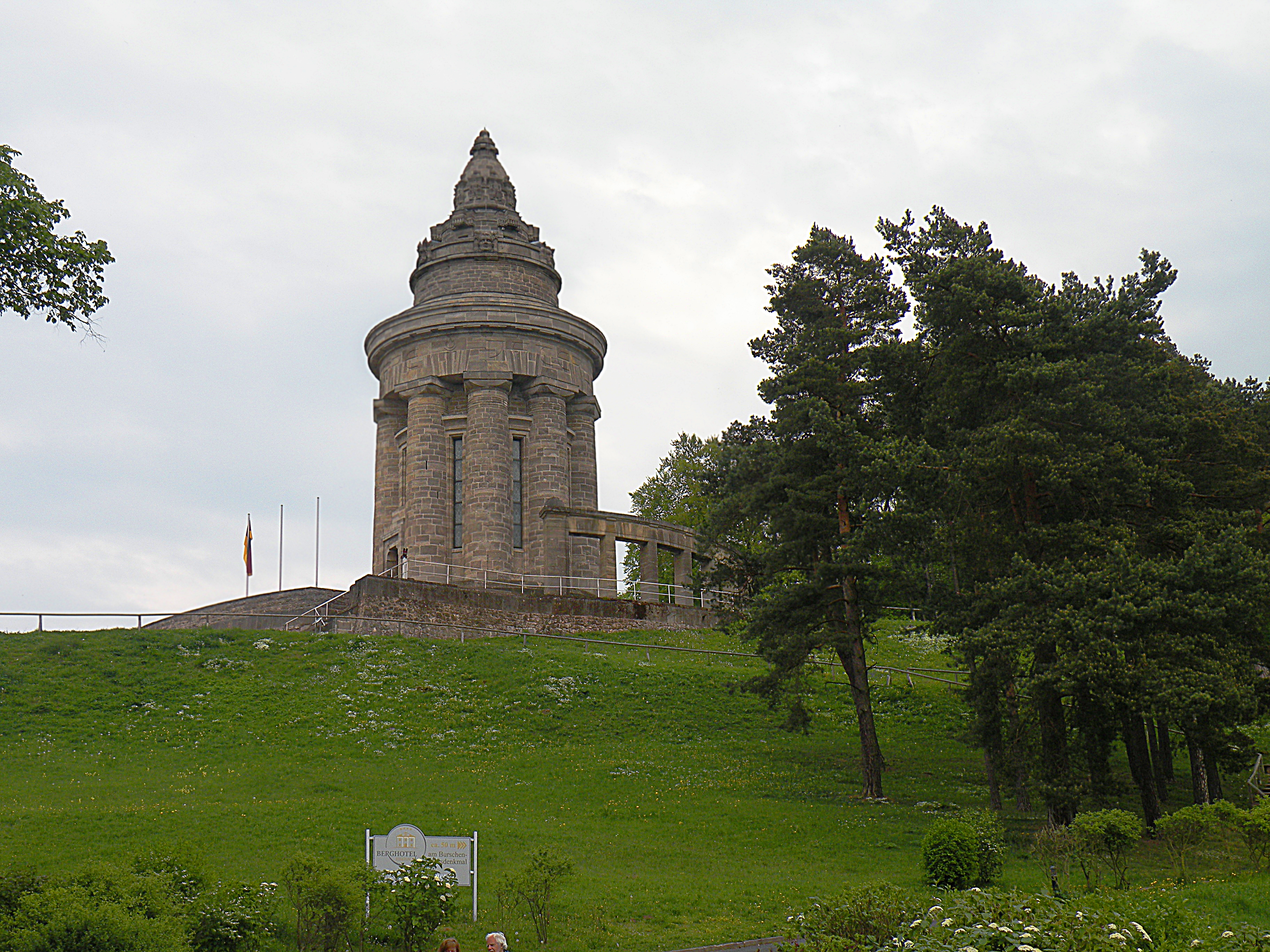 Национальный монумент Германии в память начала борьбы за объединение немецких земель.